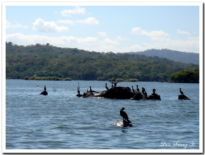 Lago de Nicaragua (Cocibolca), Granada